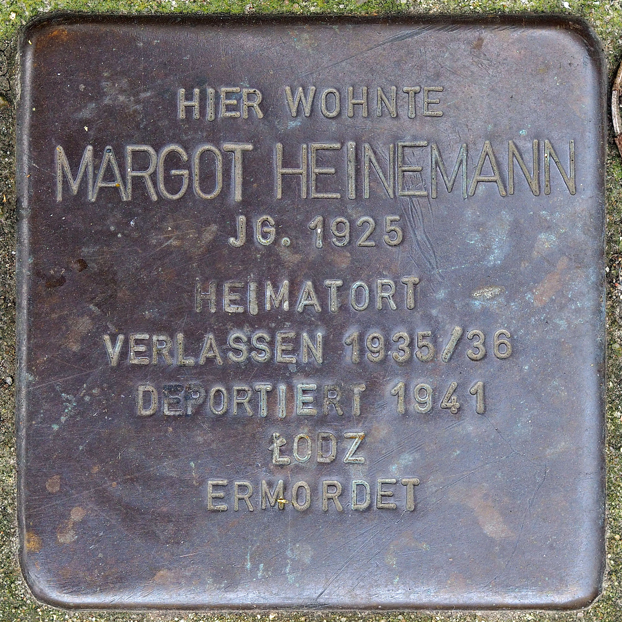 Stolpersteine GV: Heinemann, Margot